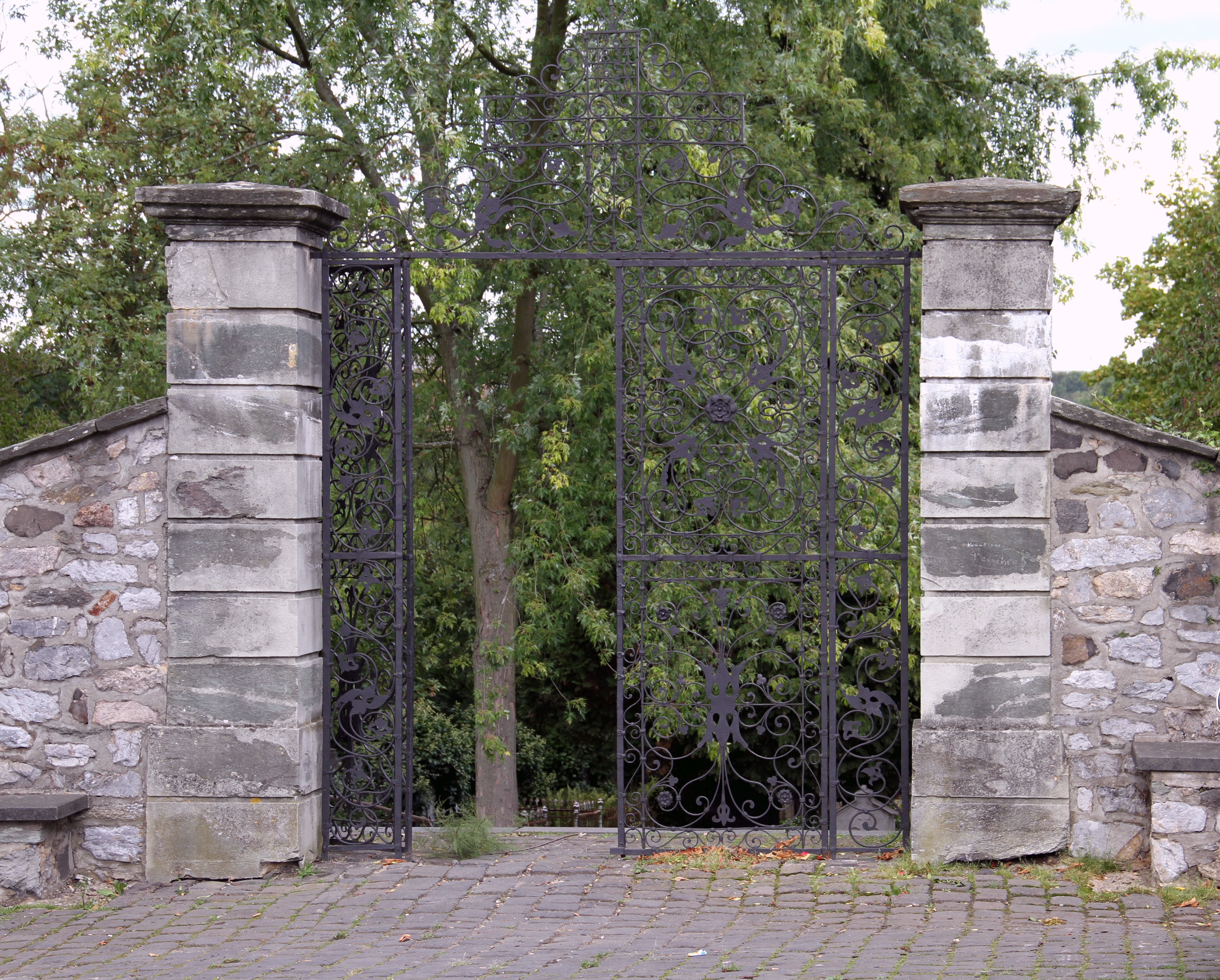 Tor des ehemaligen Friedhofs Limburg.